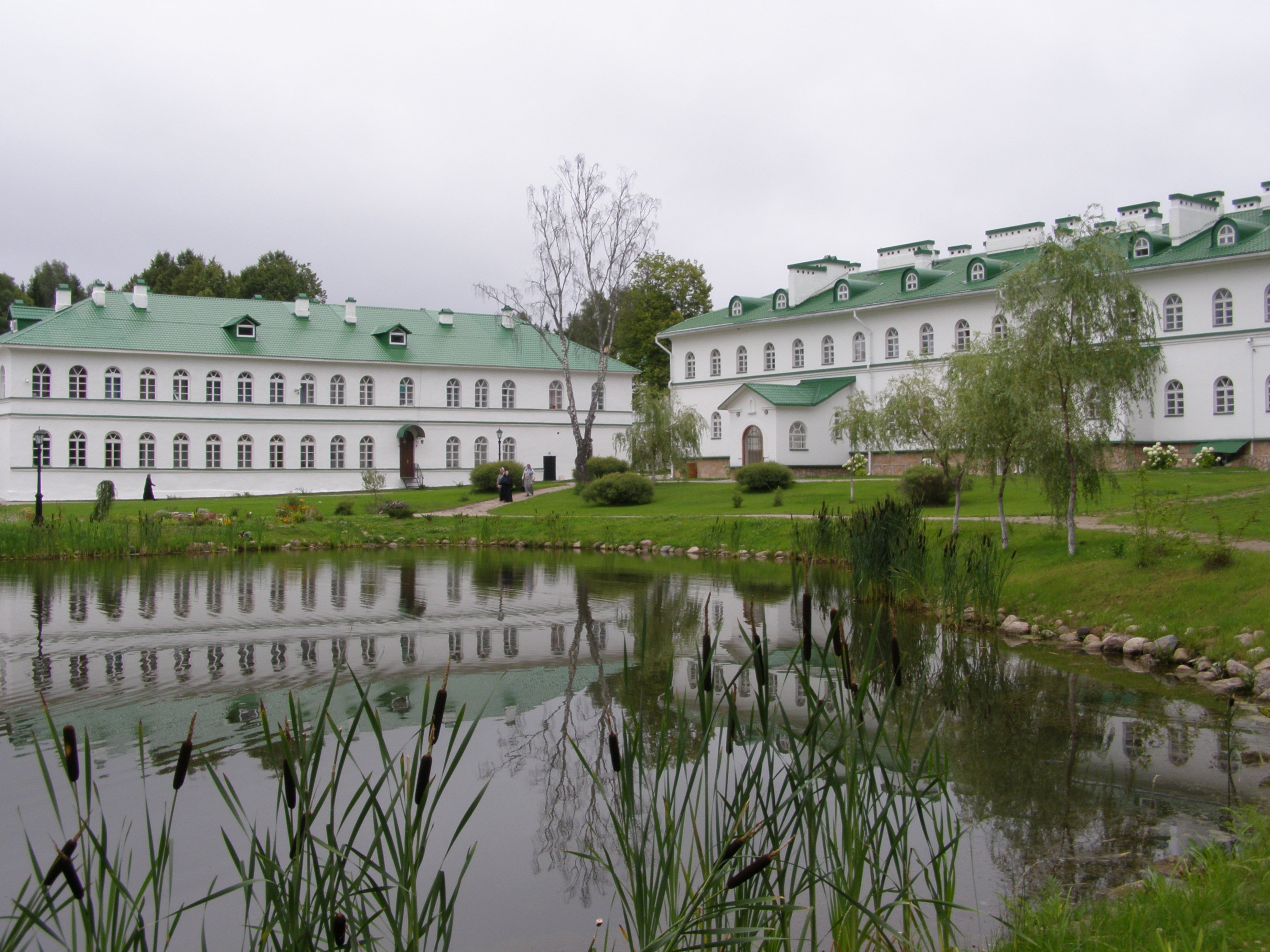 Монастырь Спасо-Елизаровский: Елизарово, Псковский район, Псковская область